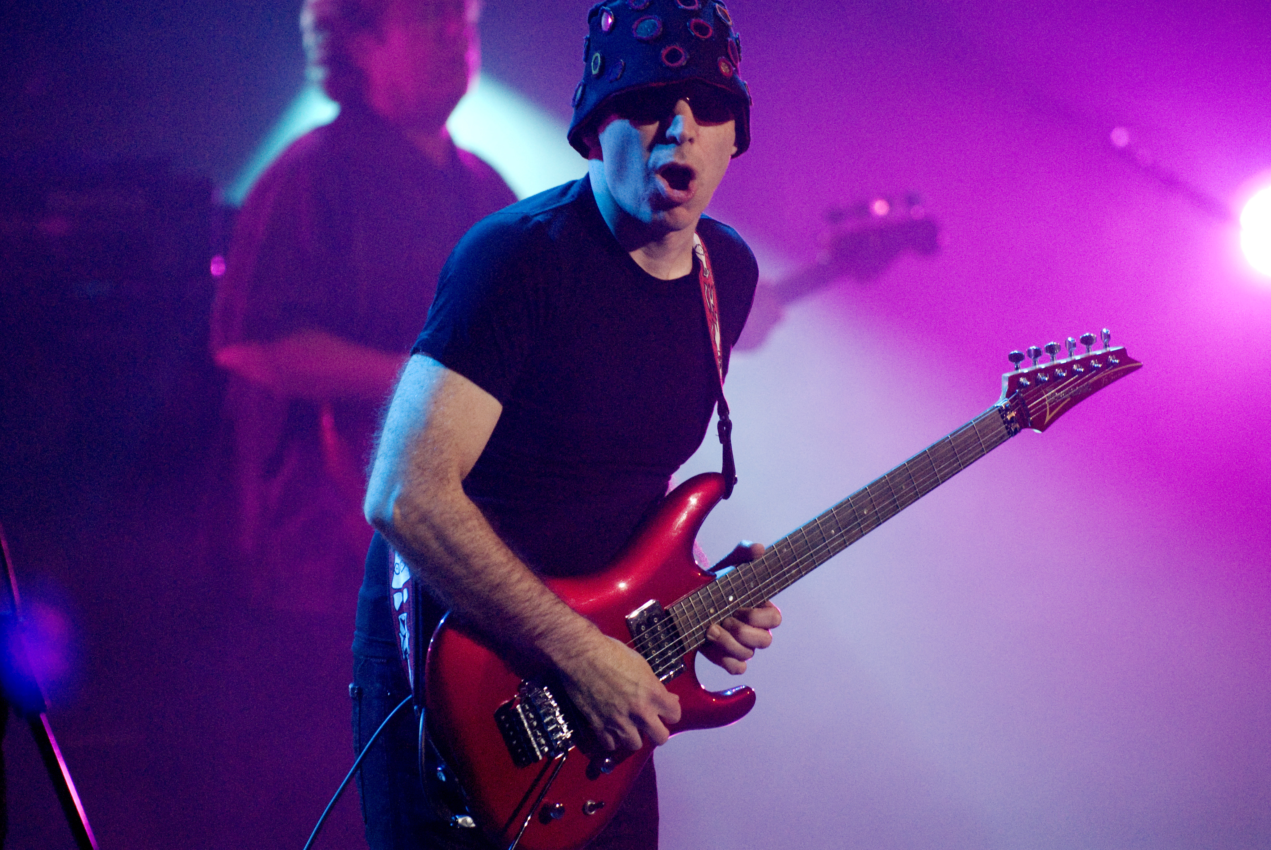 Joe Satriani